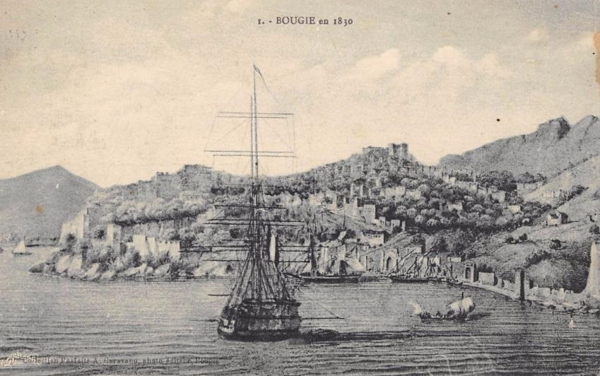 Chebec dans les eaux de Béjaïa/Bougie au XIXe siècle, vers 1830.